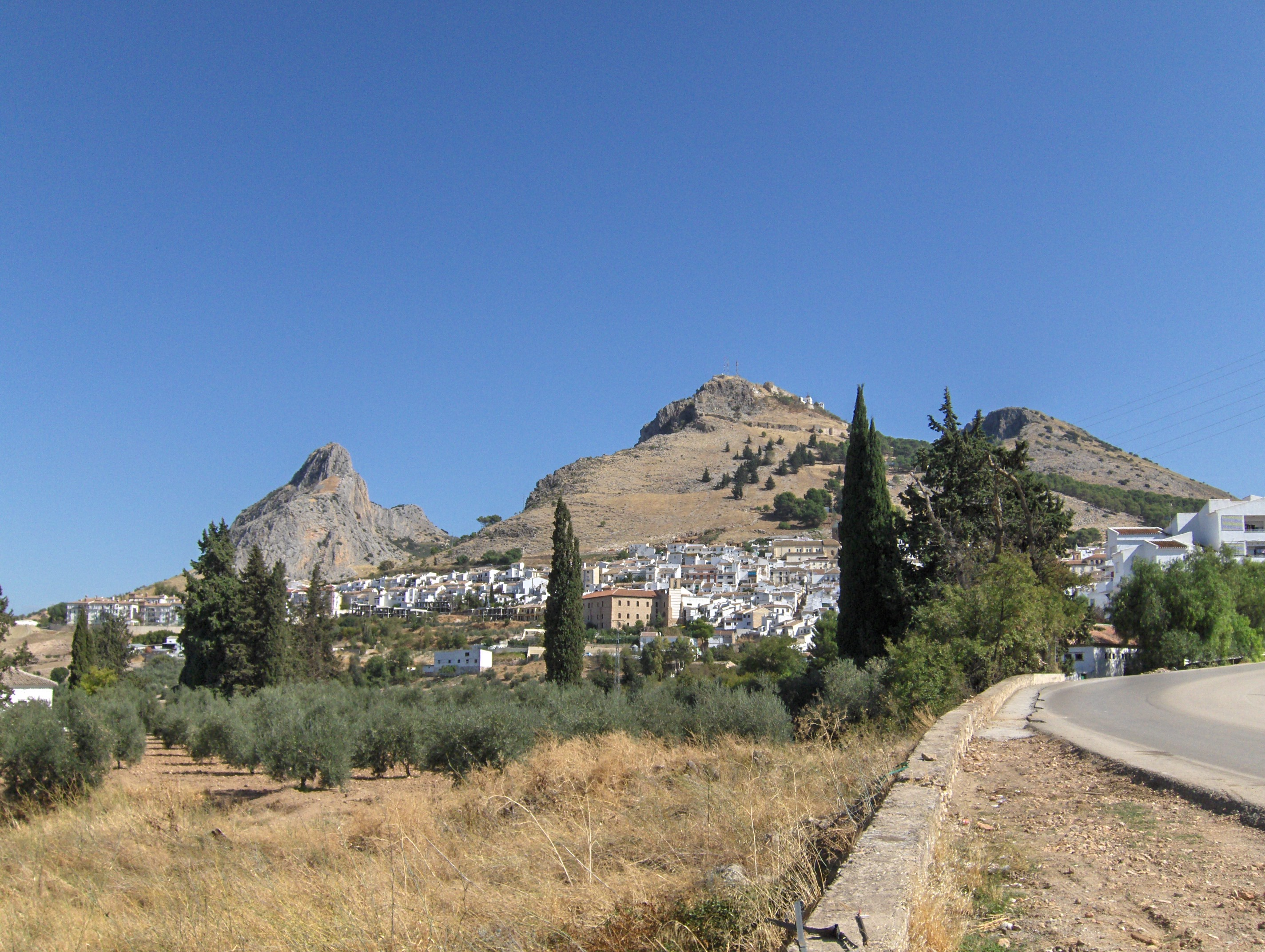 Vista de Archidona, Málaga, Spain